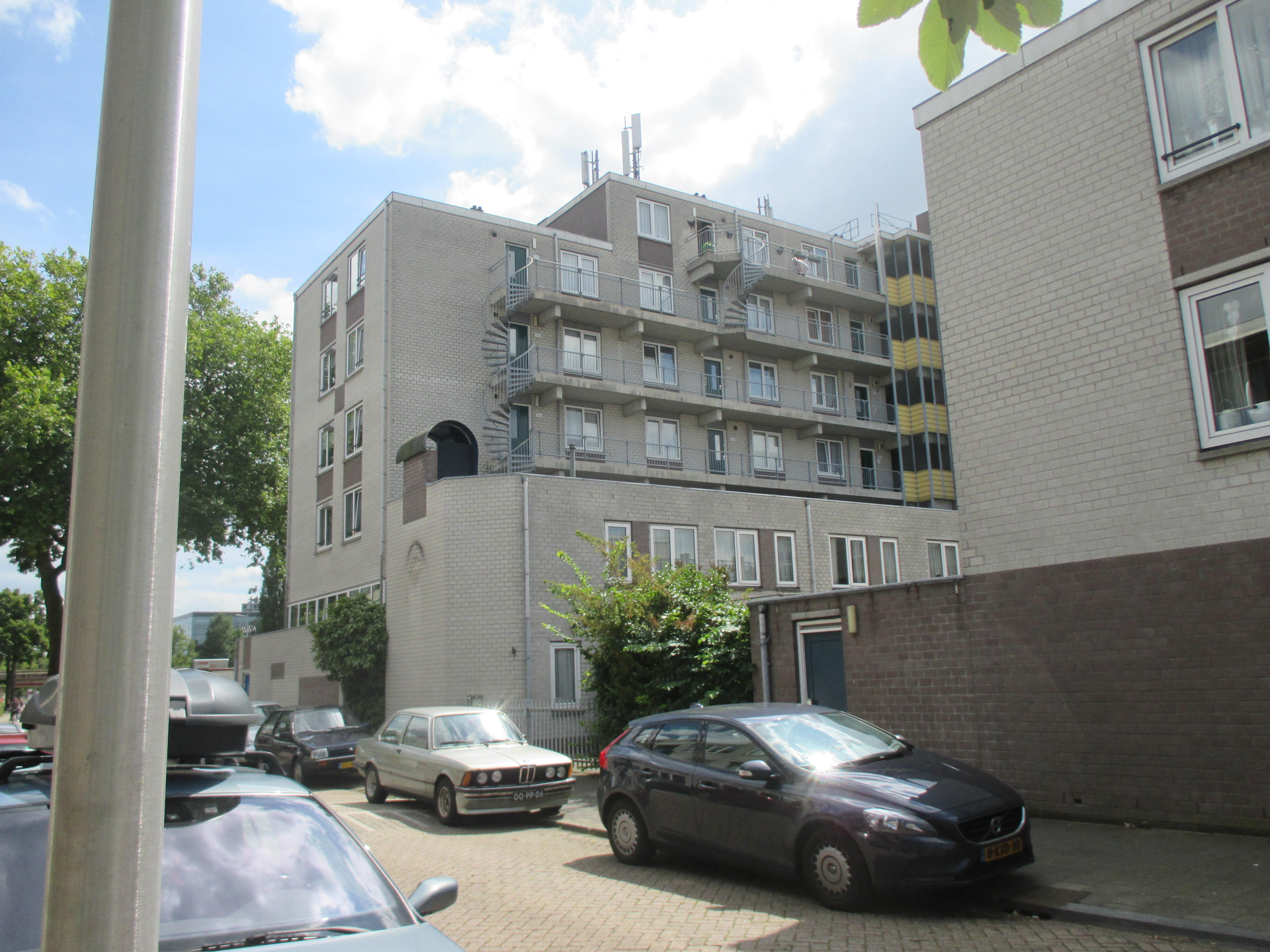 Nicolaas en Monica kapel te Utrecht /Ondiep, ingebouwd in een gebouwencomplex